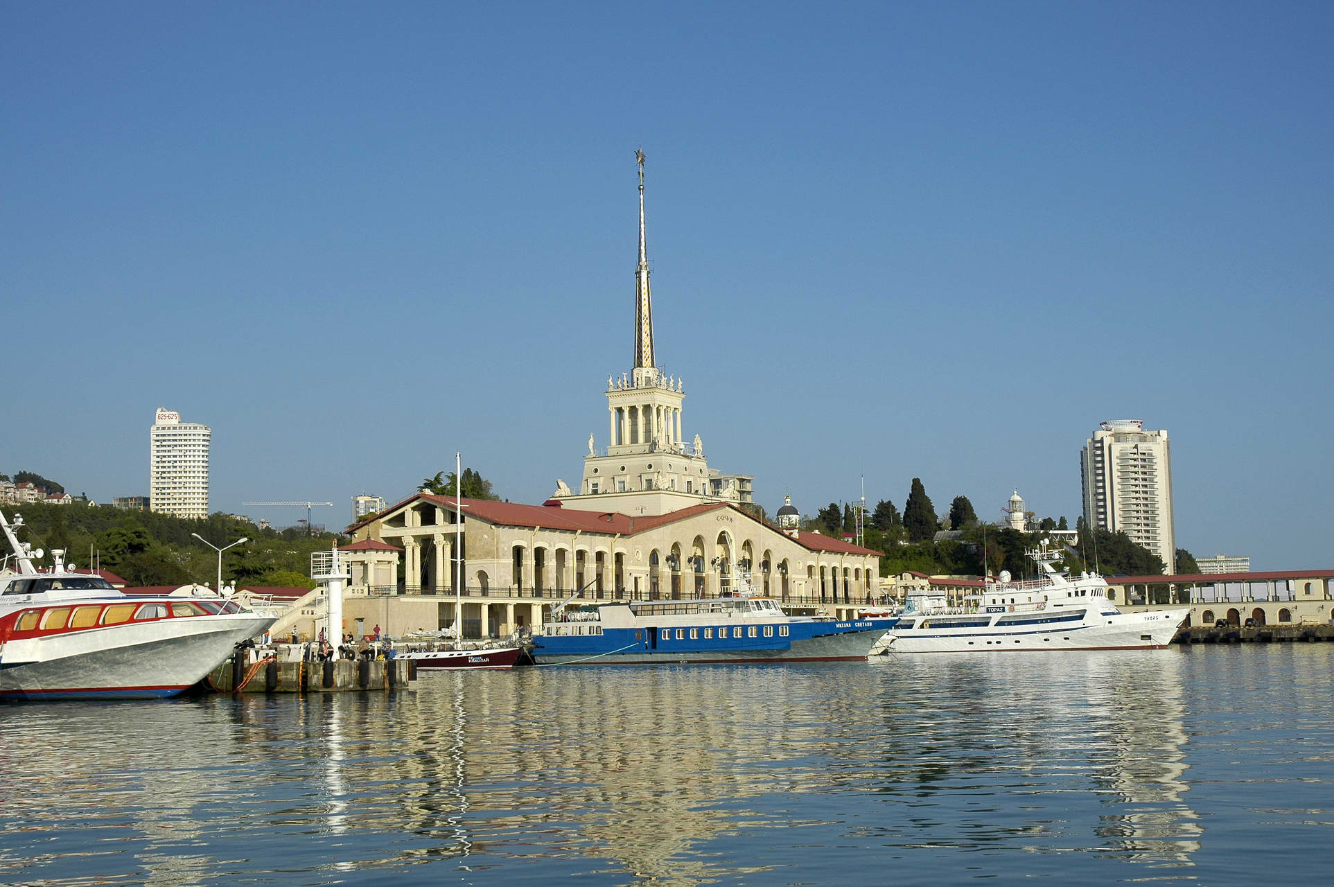 Здание морвокзала (Краснодарский край, Сочи, войкова улица, 1)